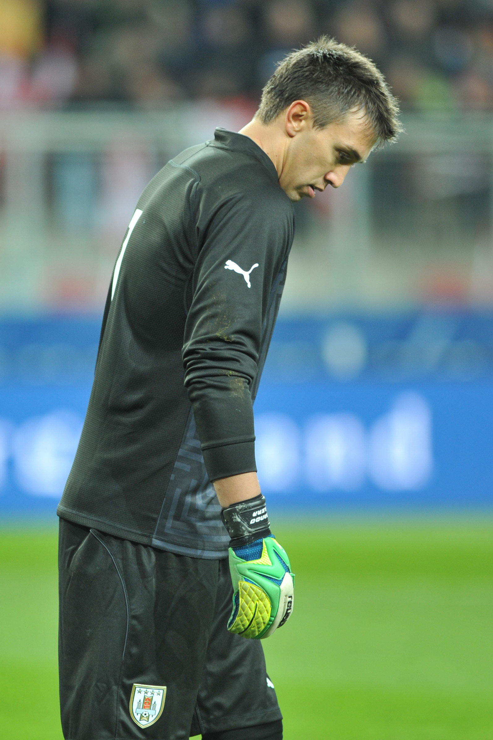 Freundschaftliches Länderspiel Österreich - Uruguay am 5. März 2014 in Klagenfurt: Fernando Muslera